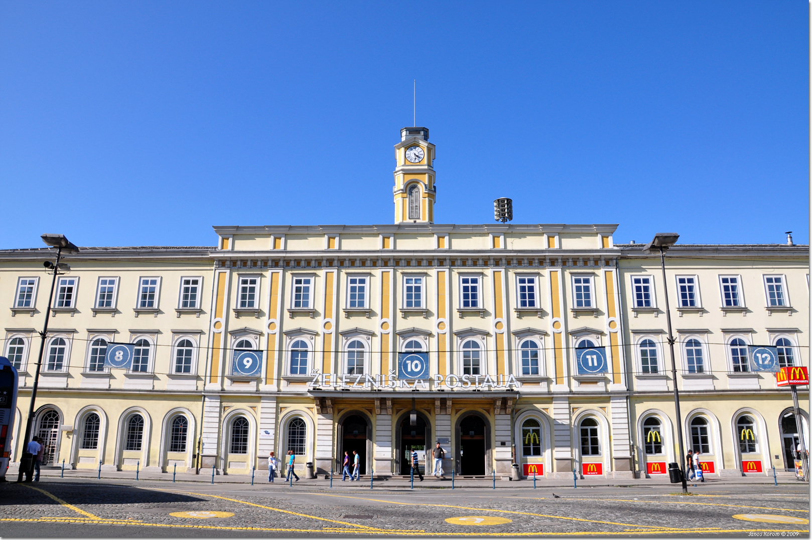 Ljubljana (296)